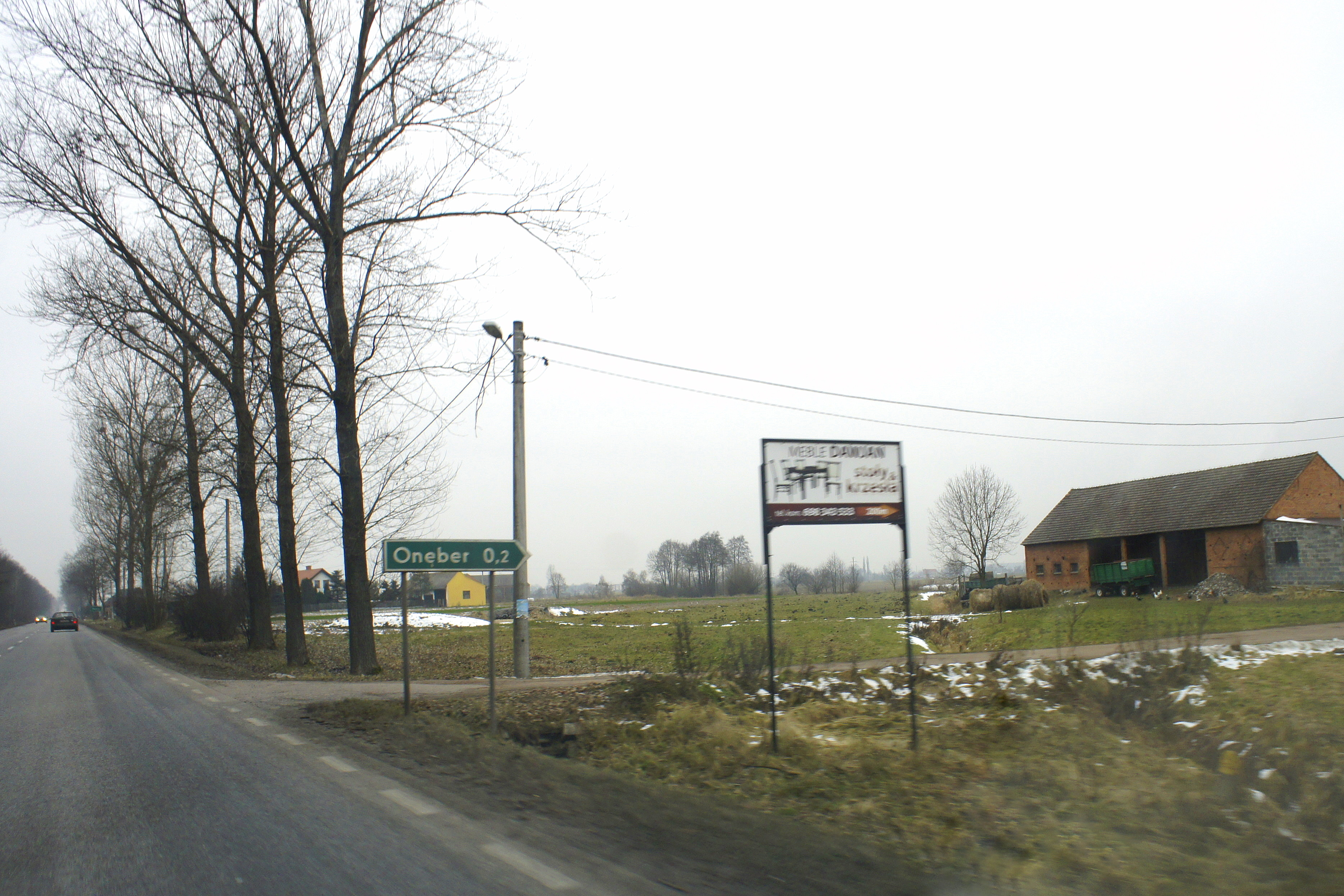 Zjazd z drogi krajowej nr 36 do Onębra. Odcinek Ostrów Wlkp.-Krotoszyn